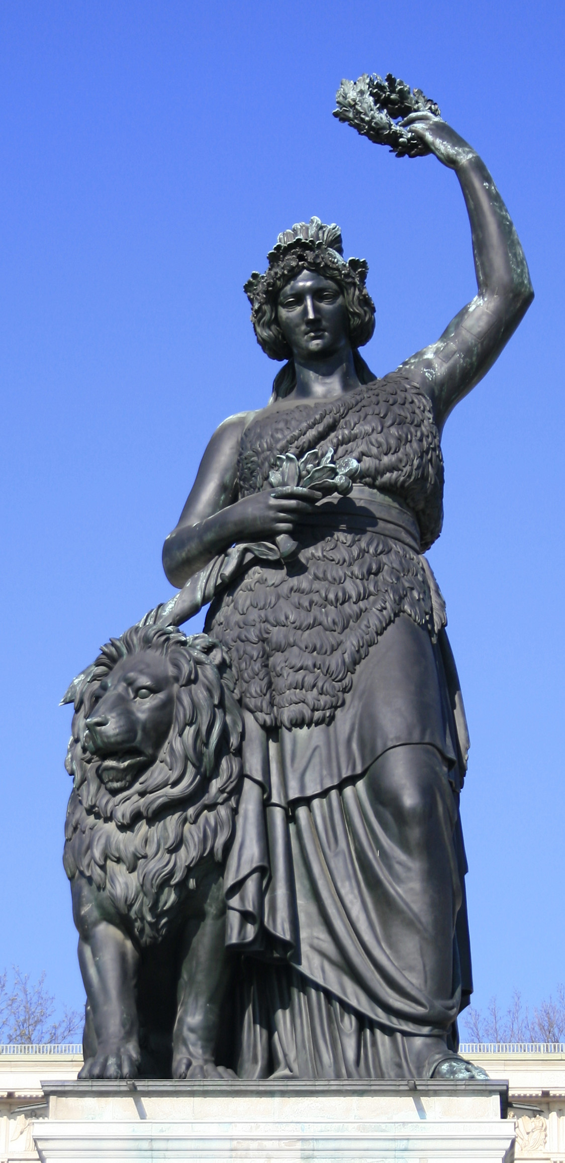 Bavaria nach Restaurierung